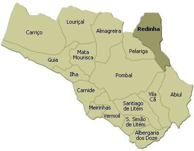 localisation de redinha dans la freguesia de pombal